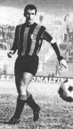 Milano, stadio San Siro. Il calciatore italiano Armando Picchi, capitano dell'Inter, in azione durante una partita casalinga contro il L.R. Vicenza, negli anni 60 del XX secolo.